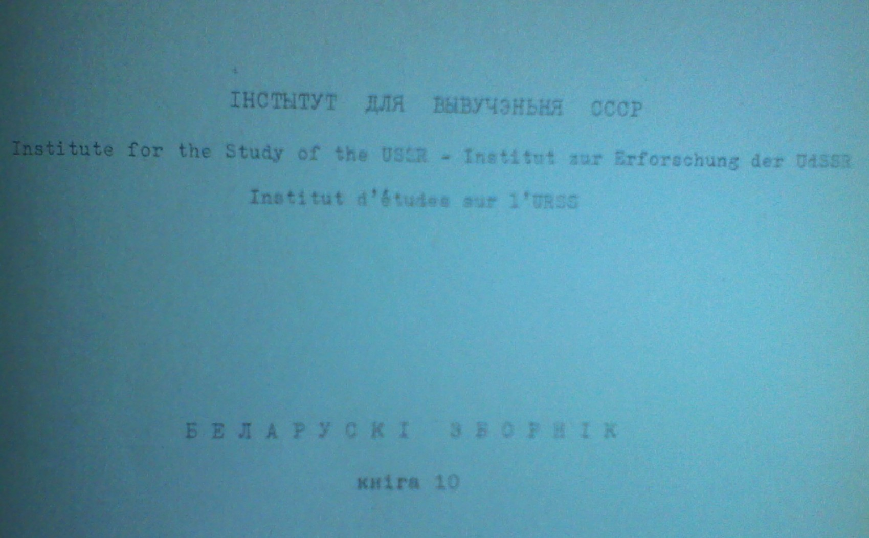 Першая старонка Беларускага зборніка №10, 1959